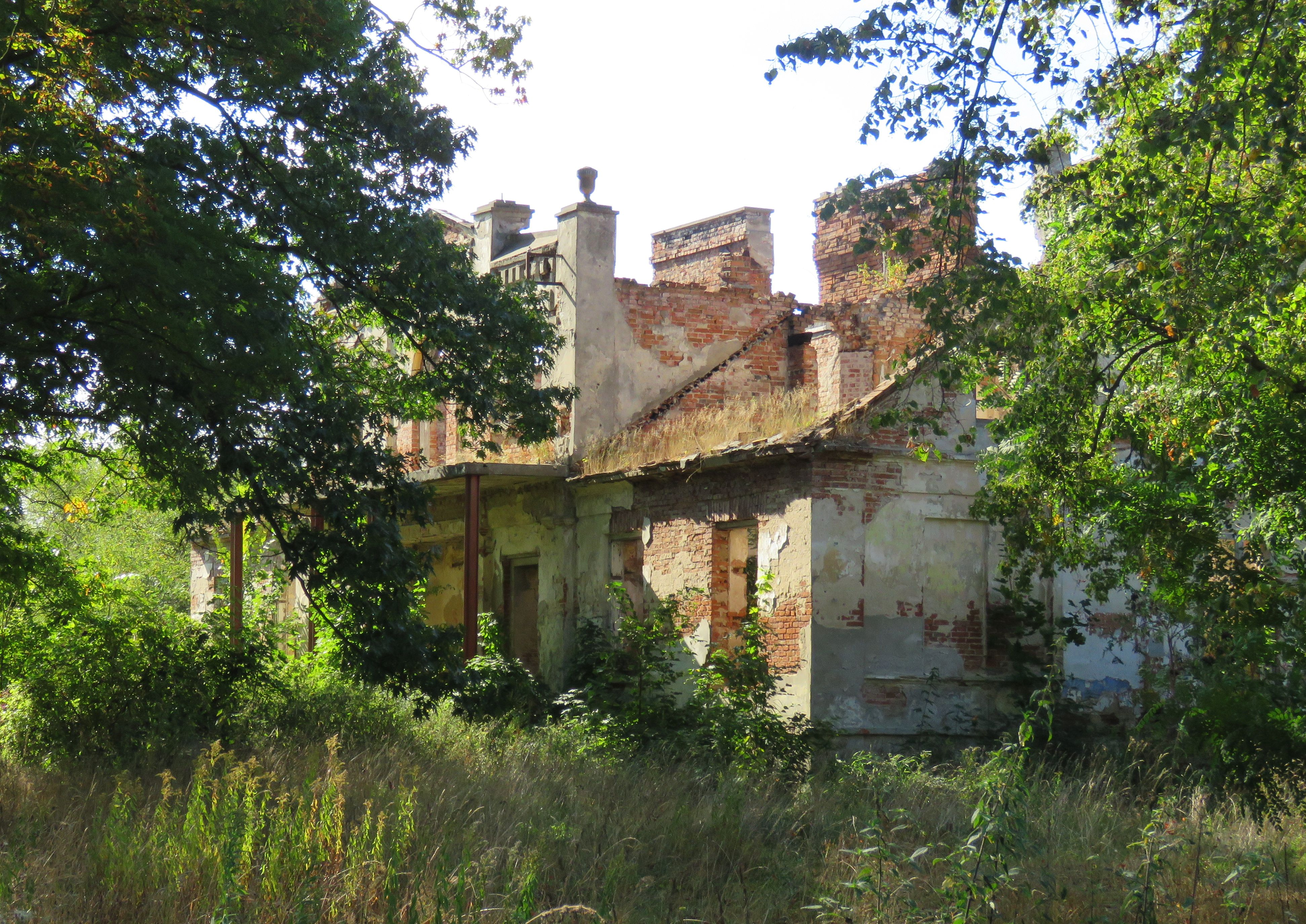 Dwór w Glinojecku